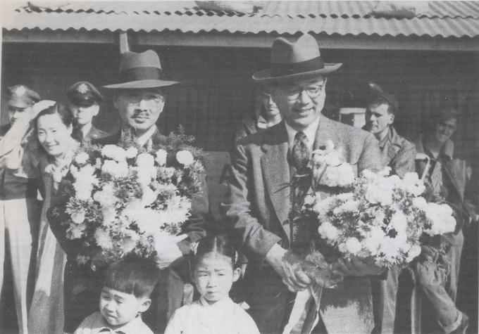 제9차 UN총회 파견차 출국 직전의 장택상과 장면